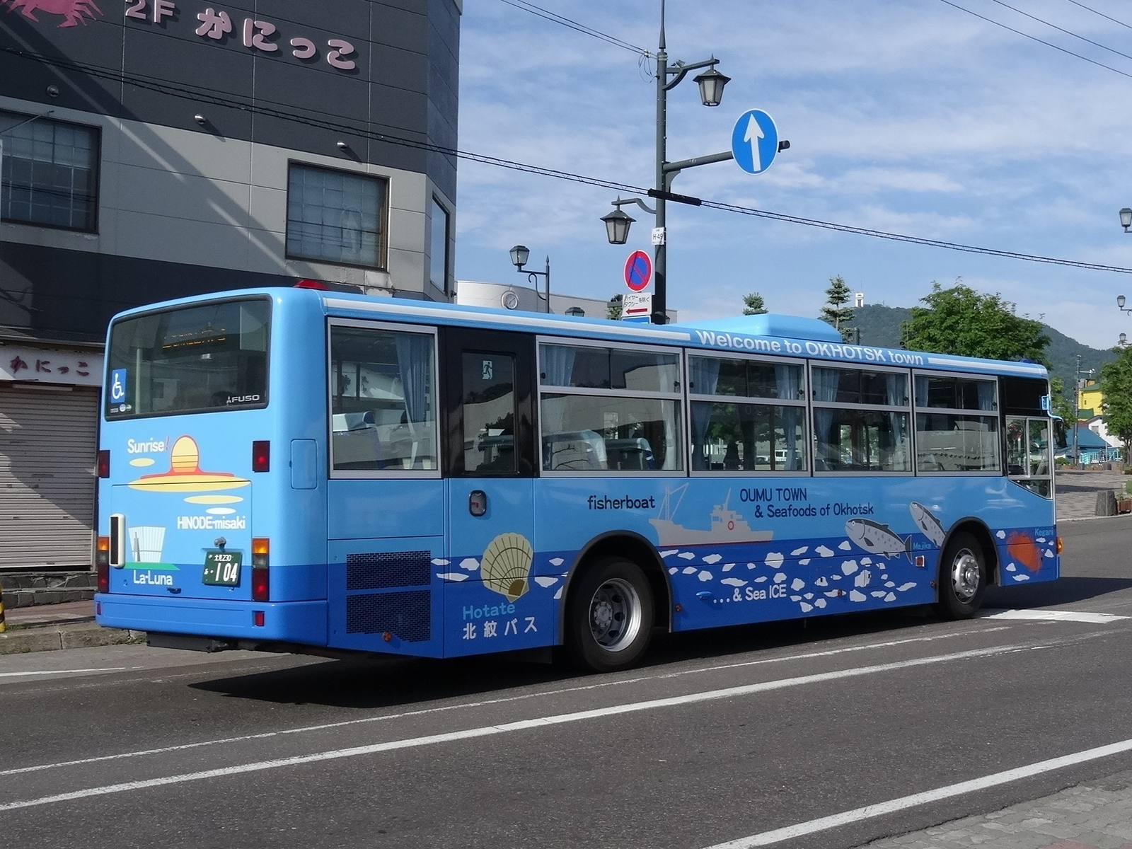 Monbetsu to Takinoue